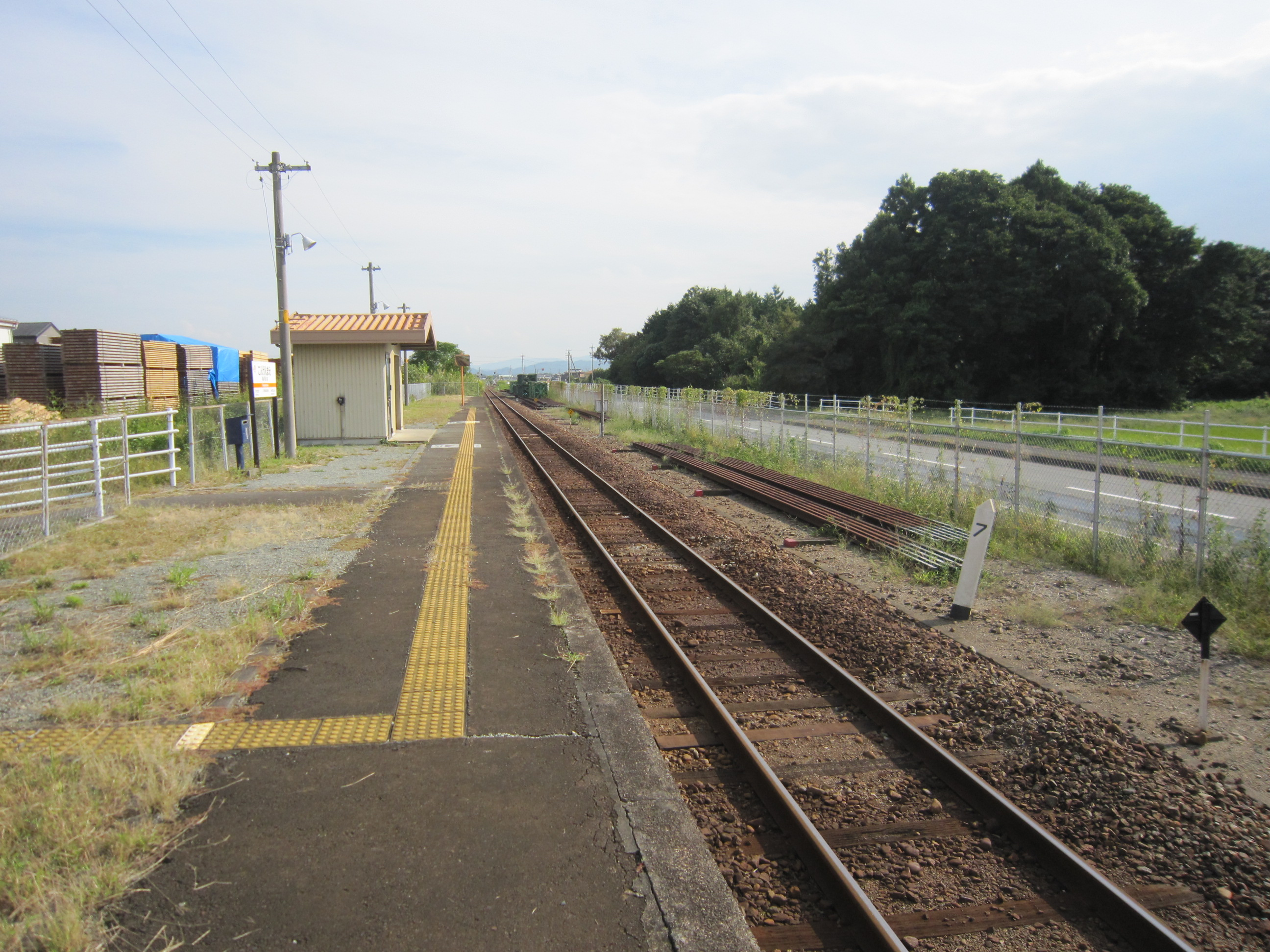 ホーム 投稿者撮影